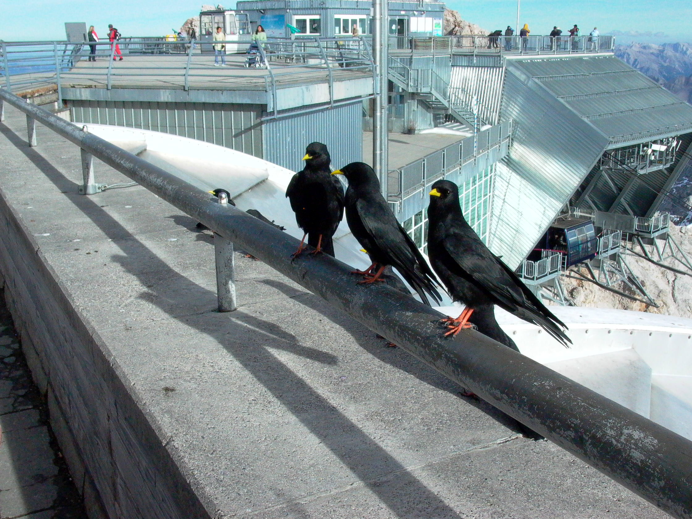 Drei Dohlen auf der Zugspitze